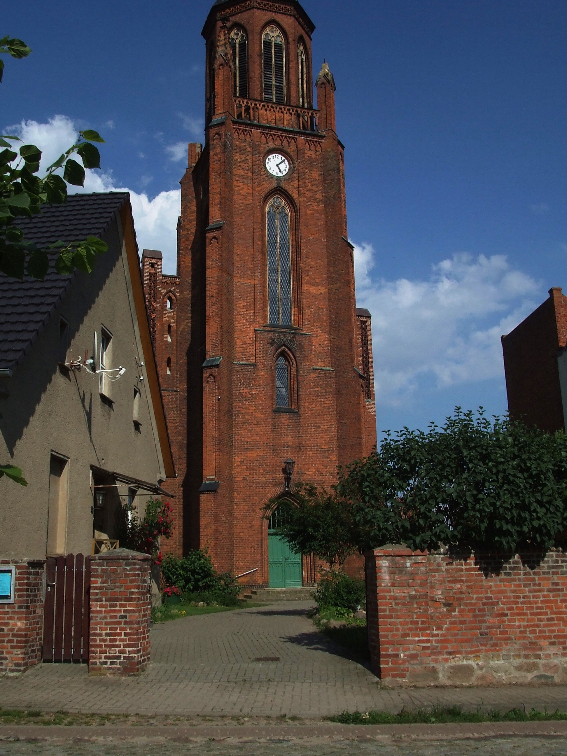 Kirchturm in Stüdenitz von der Lohmer Straße aus